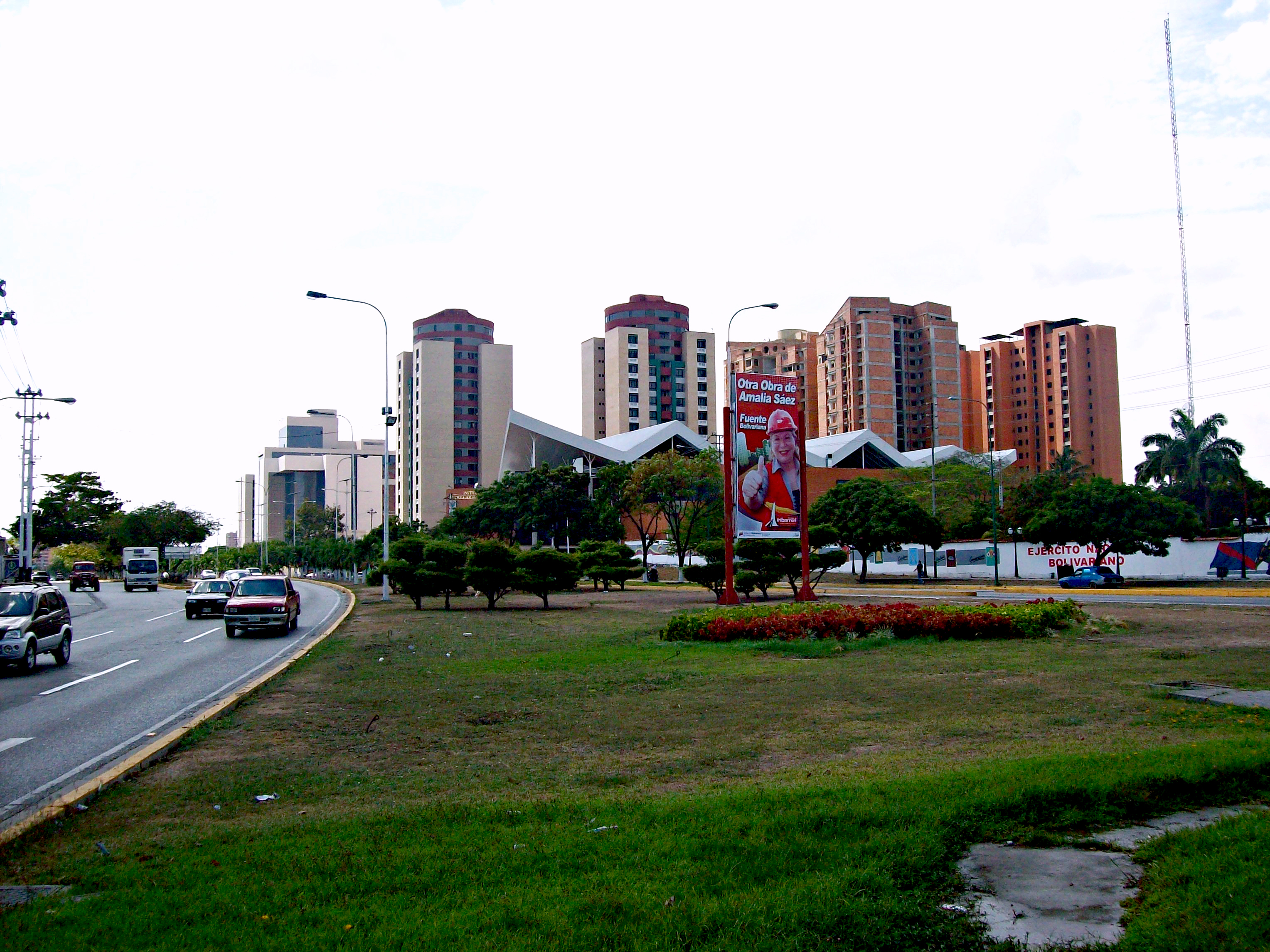 Inicio de la Avenida Venezuela al este de la ciudad de Barquisimeto.